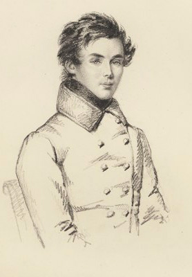 Johan Elias Cardon (1802-1878)